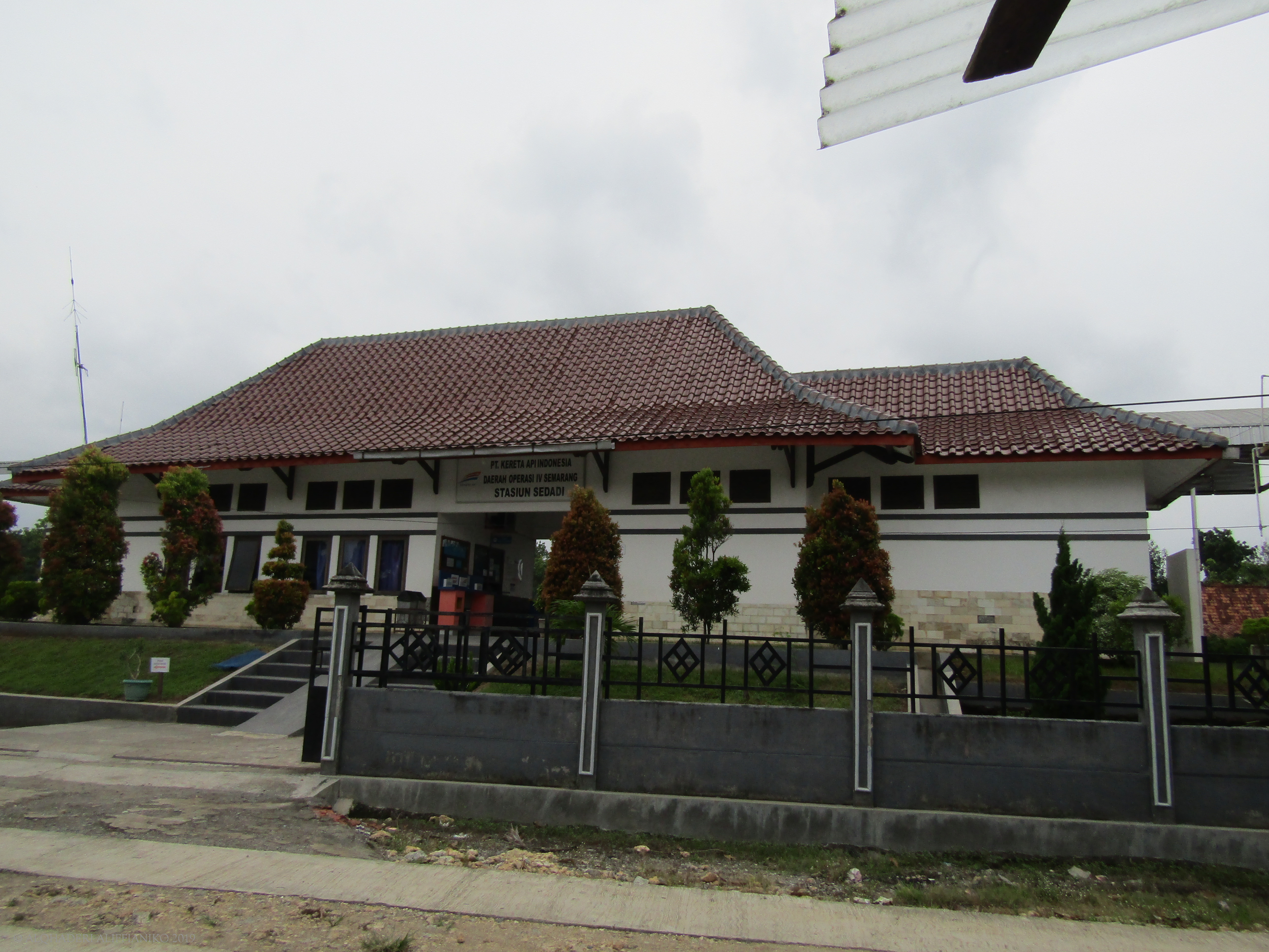 Tampak depan Stasiun Sedadi, 2019